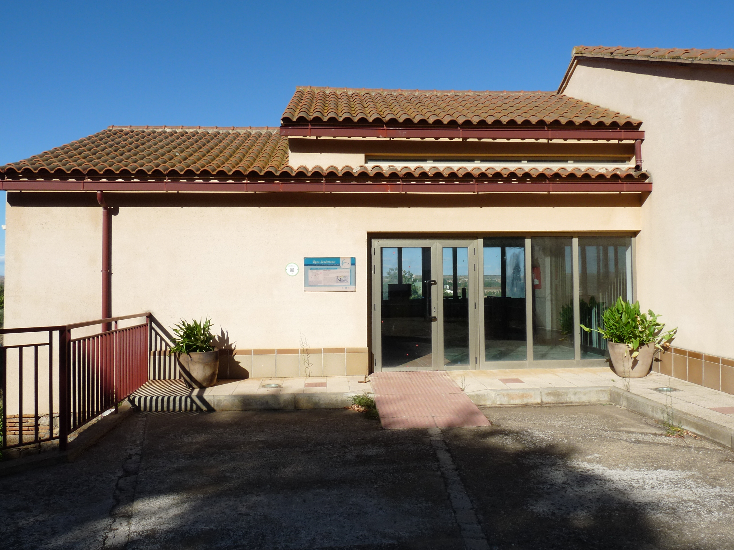 Alcolea de Cinca - Centro de interpretación Ramón J. Sender